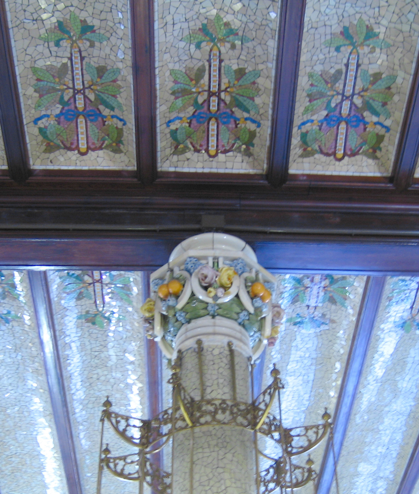 estació nord València